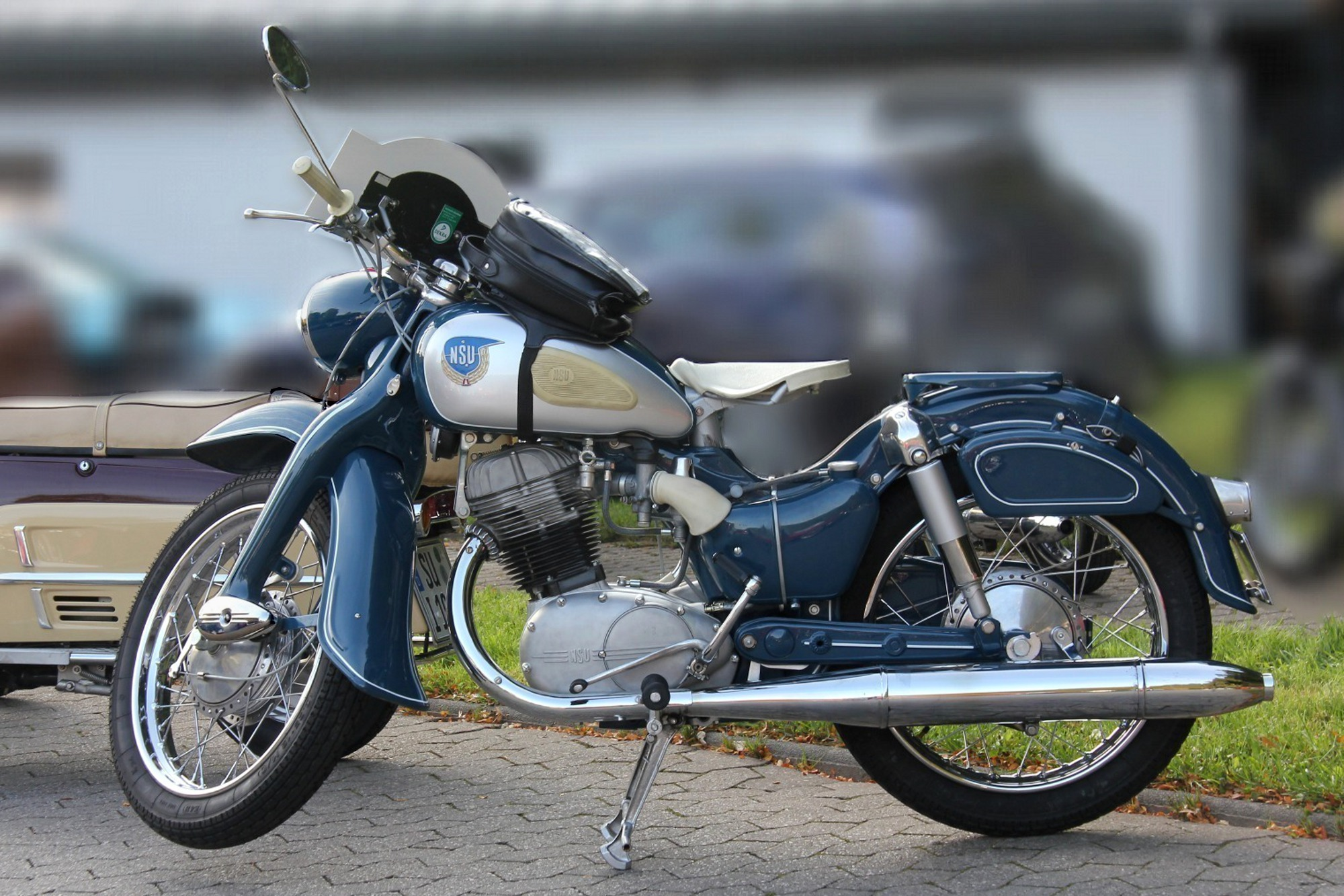 NSU Supermax, Baujahr 1957, bei der Moselschiefer-Classic in Mayen